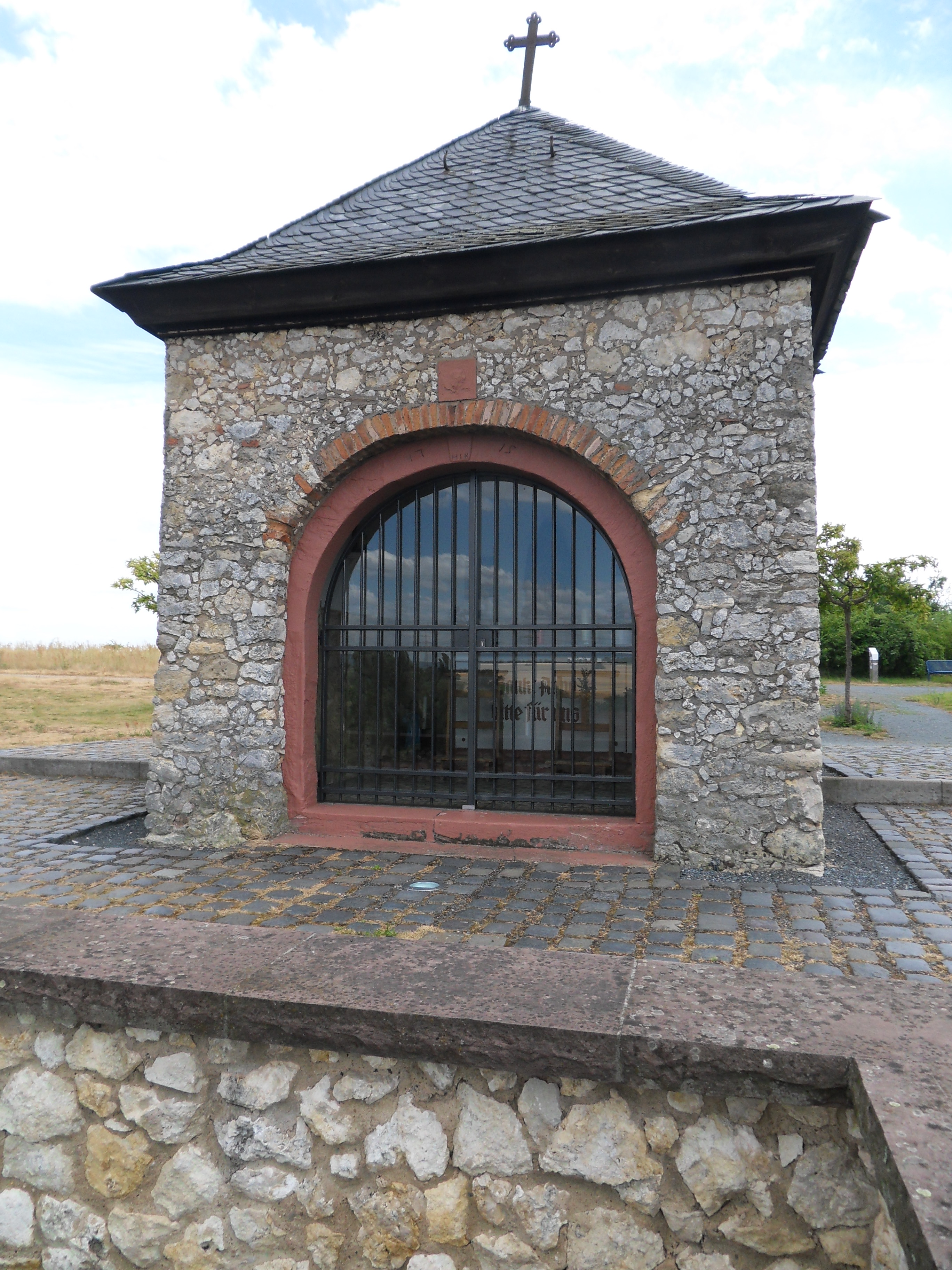 Die St. Anna-Kapelle auf dem Berg über der Wiesenmühle wurde 1715 als Hauskapelle für die wenige Jahre zuvor am Wickerbach errichtete Mühle gebaut